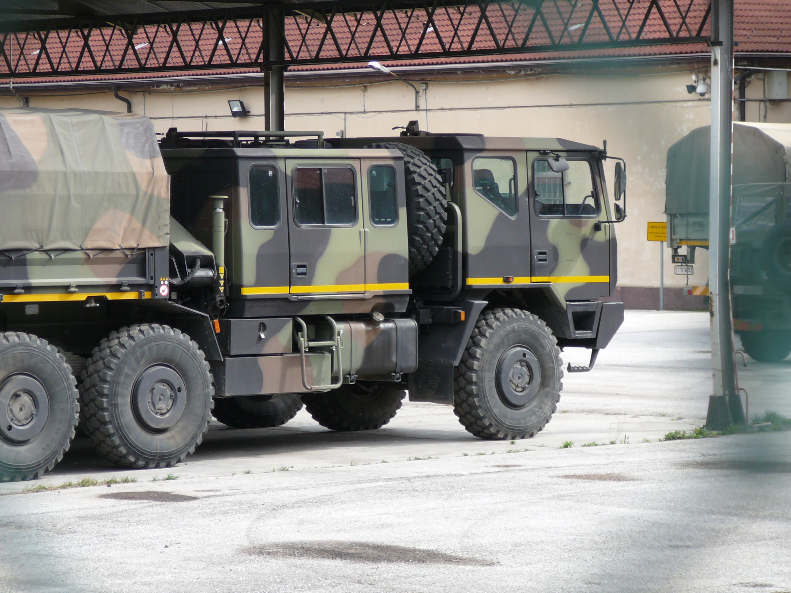 Iveco ACTL parcheggiato a Trento